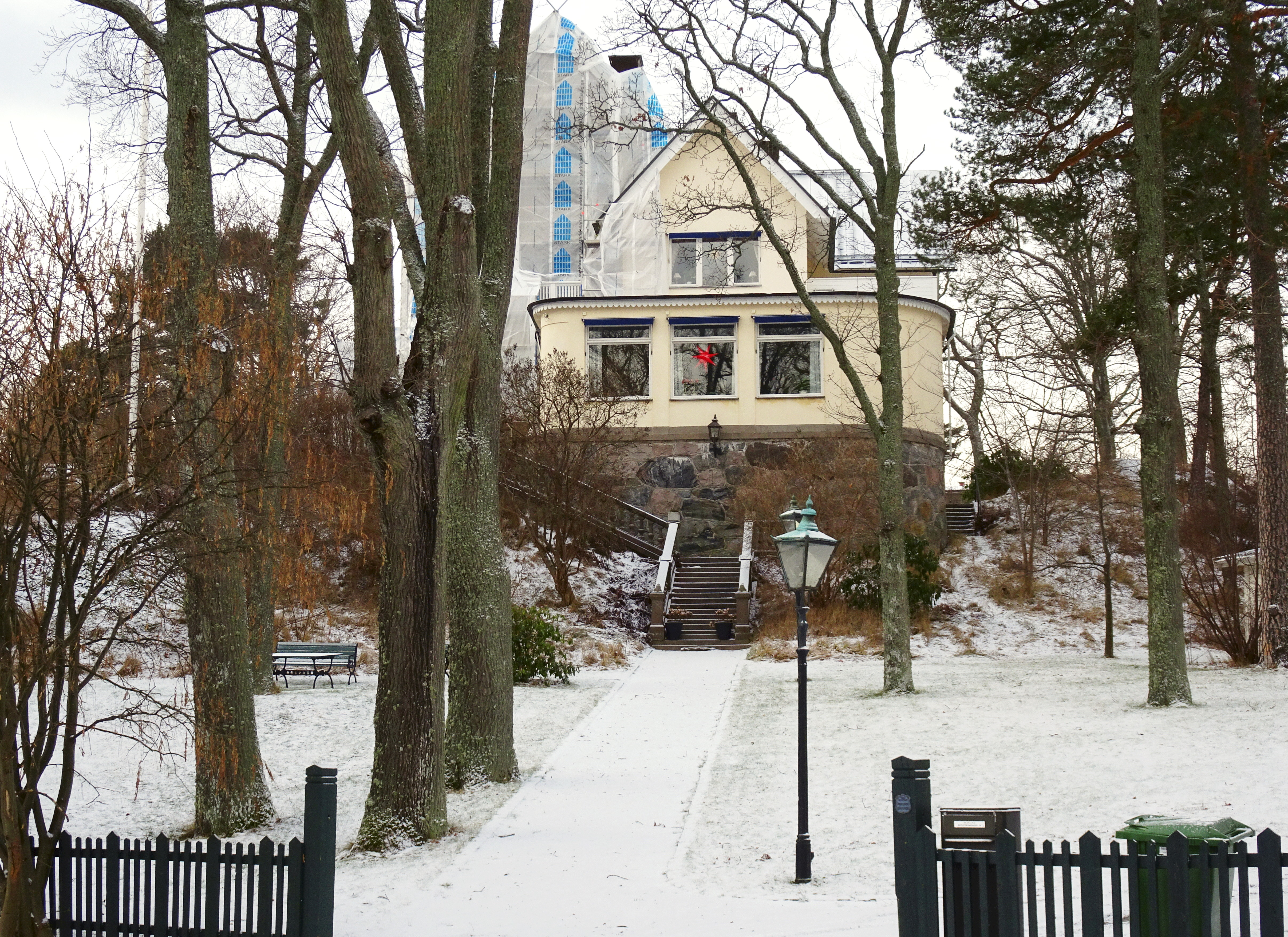 Villa vid Saltsjöpromenaden 18 i Saltsjöbaden, även kallad "Kråkslottet"